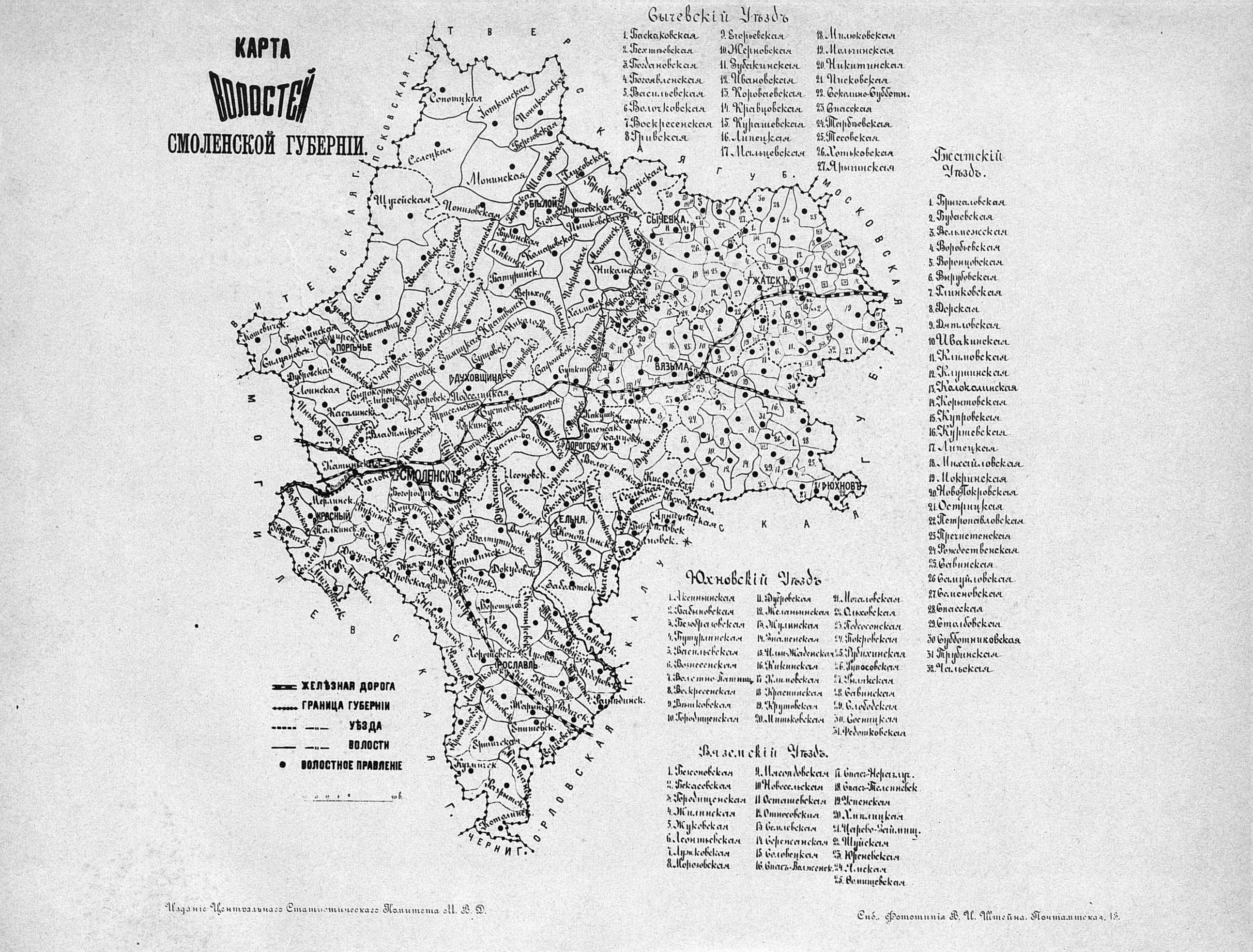 Карта волостей Смоленской губернии